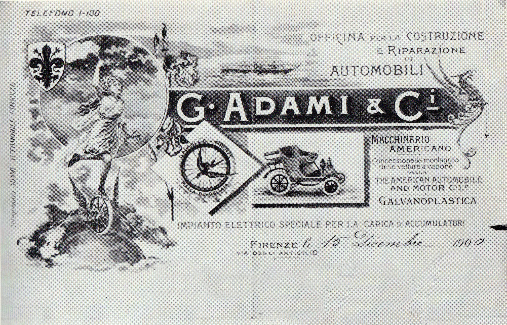 Biglietto d'invito della casa automobilistica Adami (Firenze)